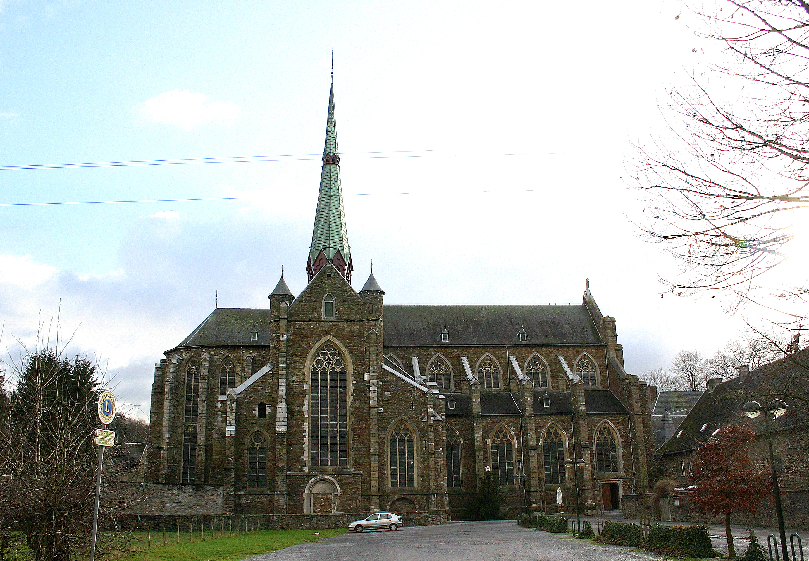 D'Abteikierch vum Val-Dieu